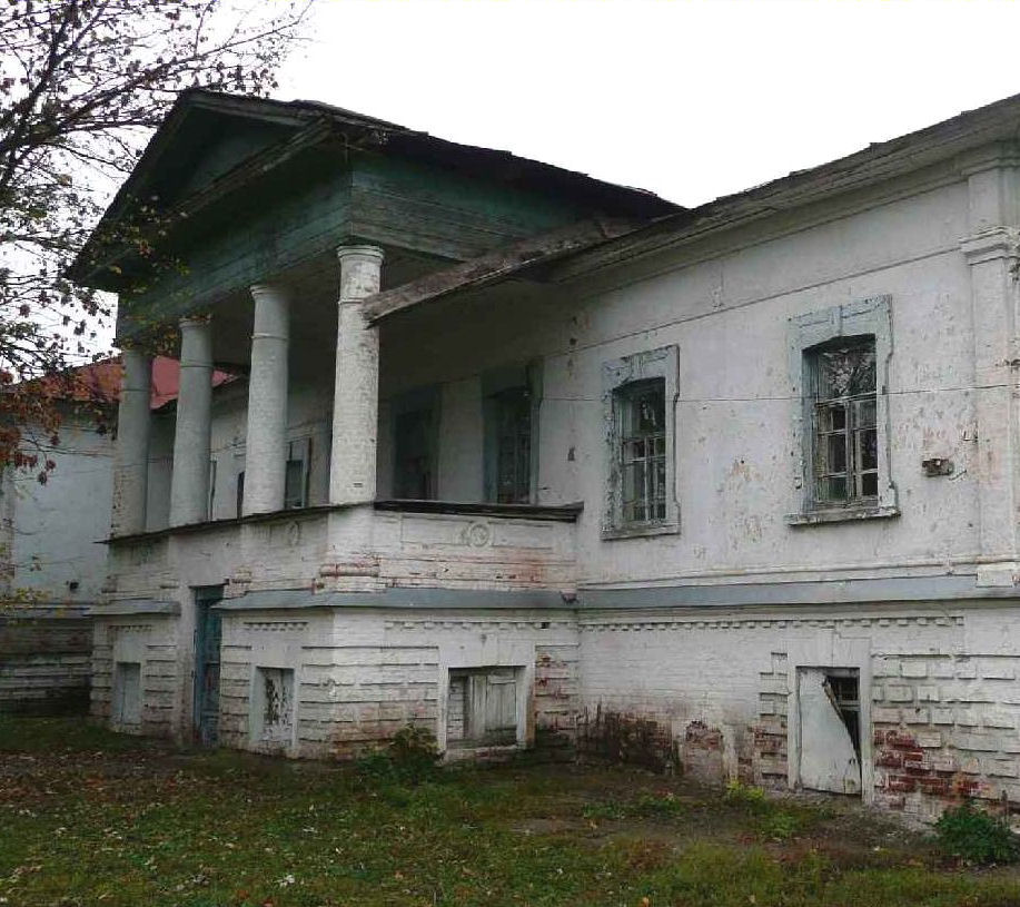 Фото 2008 года